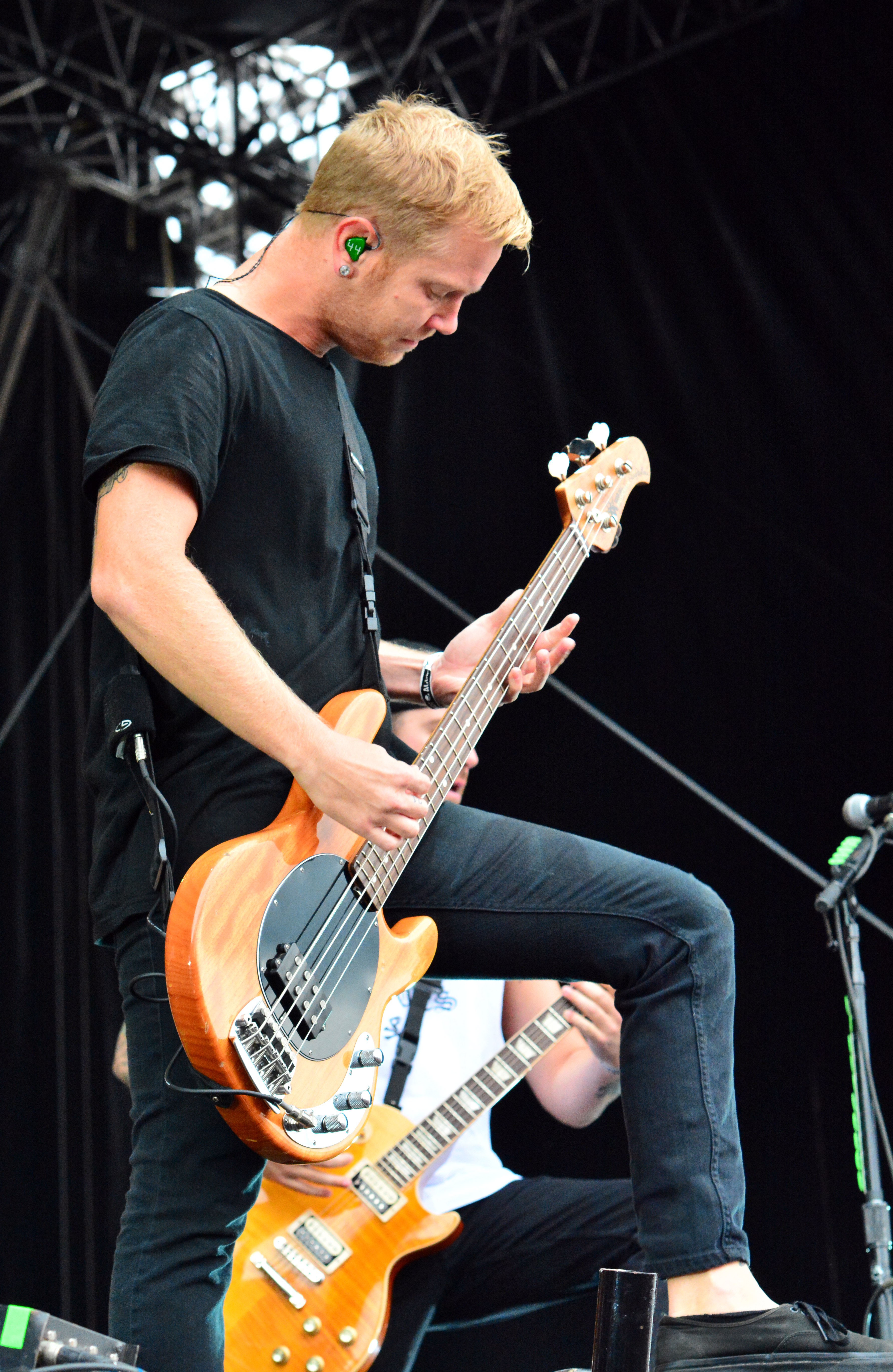 Joshua Woodard von A Day to Remember beim Elbriot 2014